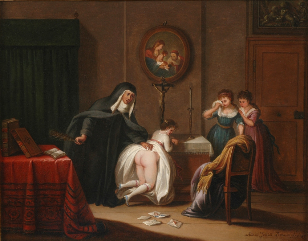 Mädchenschule